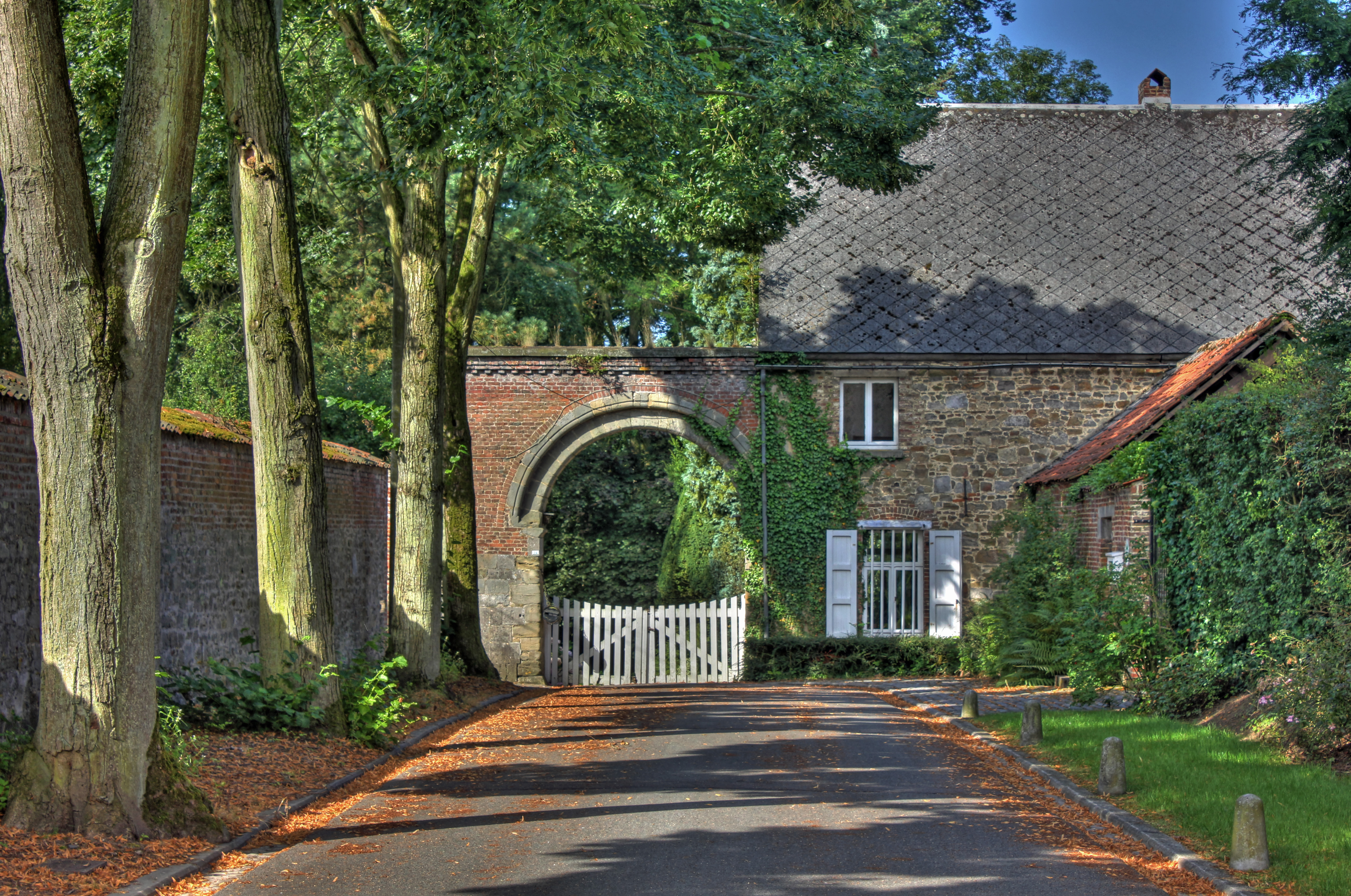 Maison du Portier : ancienne entrée de l'abbaye Saint-Feuillien du Roeulx (Belgique)